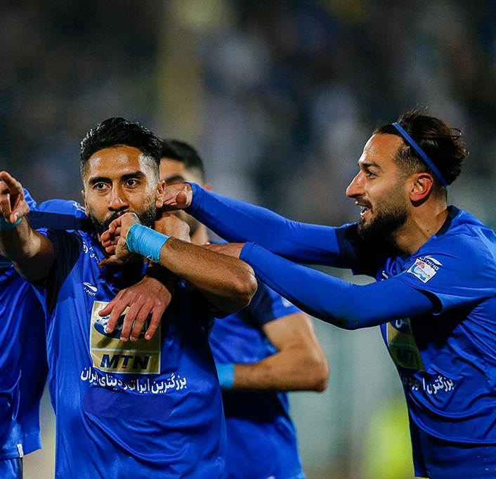 دیدار تیم های فوتبال استقلال تهران و صنعت نفت آبادان